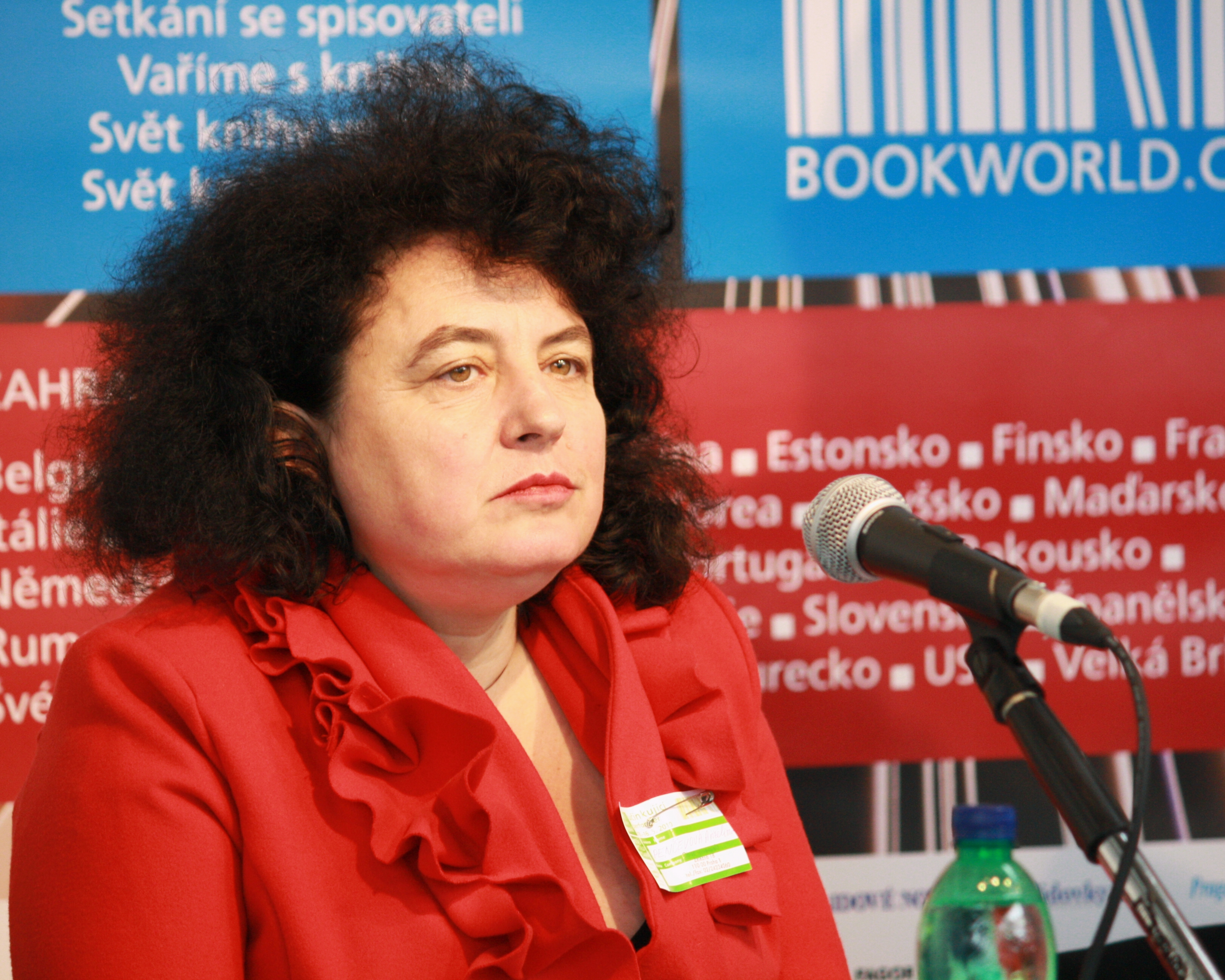 Svět knihy 2010 - Anželina Penčeva, laureátka ceny Premia Bohemica This photograph was taken with a DSLR from WMCZ's Camera grant. Personality rights warning Although this work is freely licensed or in the public domain, the person(s) shown may have rights that legally restrict certain re-uses unless those depicted consent to such uses. In these cases, a model release or other evidence of consent could protect you from infringement claims.